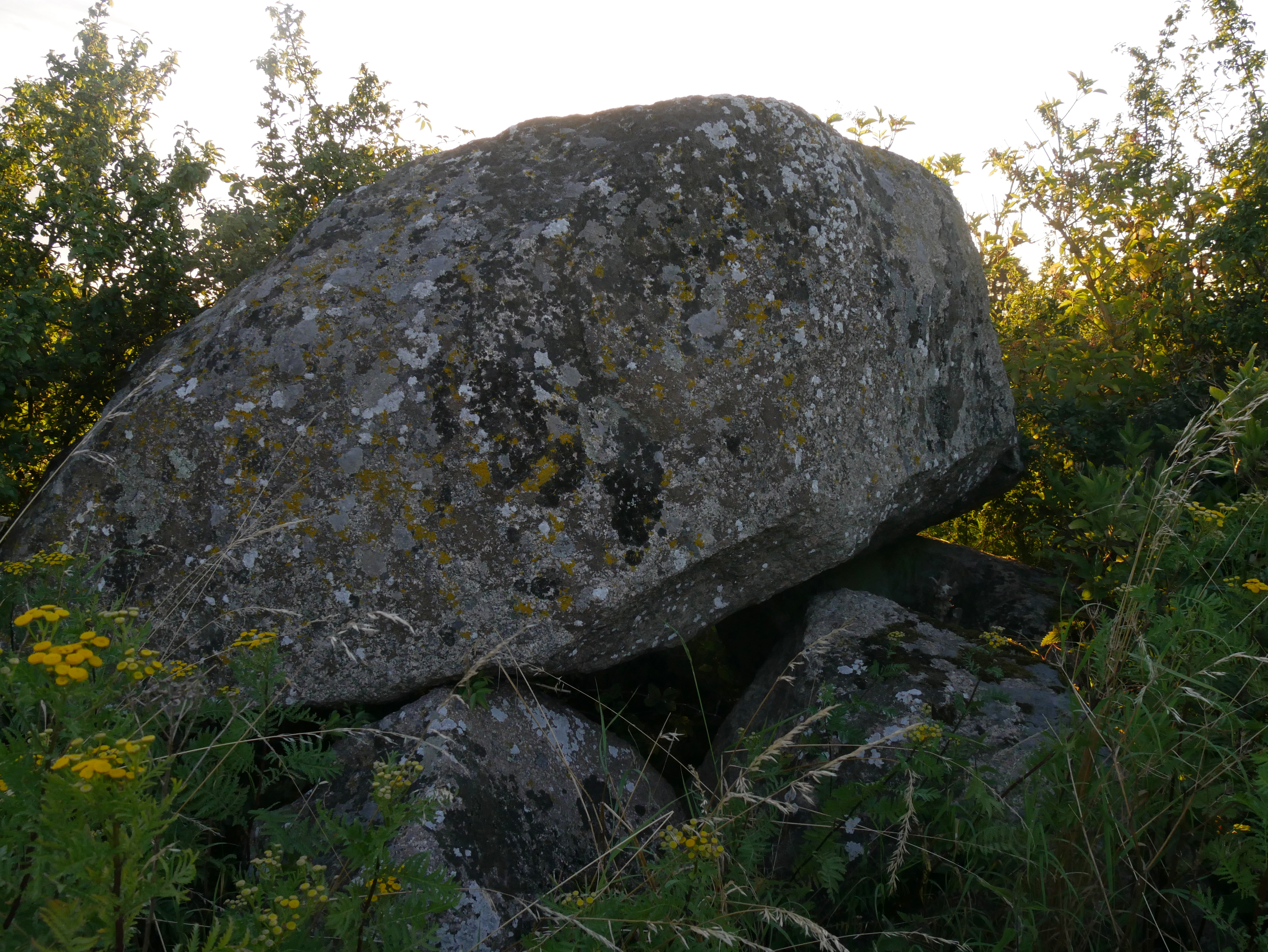 Snave Dyssekammer. Die Snave Dyssekammer bei Dreslette ist die Nord-Süd orientierte ausgegrabene Kammer eines Urdolmen mit vier erhaltenen Tragsteinen (einer fehlt), einem Schwellenstein an der Zugangsseite im Süden und einem Deckstein. Der Grundriss ist trapezoid. Der ehemalige Hügel ist in Resten erhalten. Ansicht von Osten.